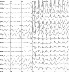 EEG-ს გამოყენებით ჩაწერილი ტვინის ტალღები